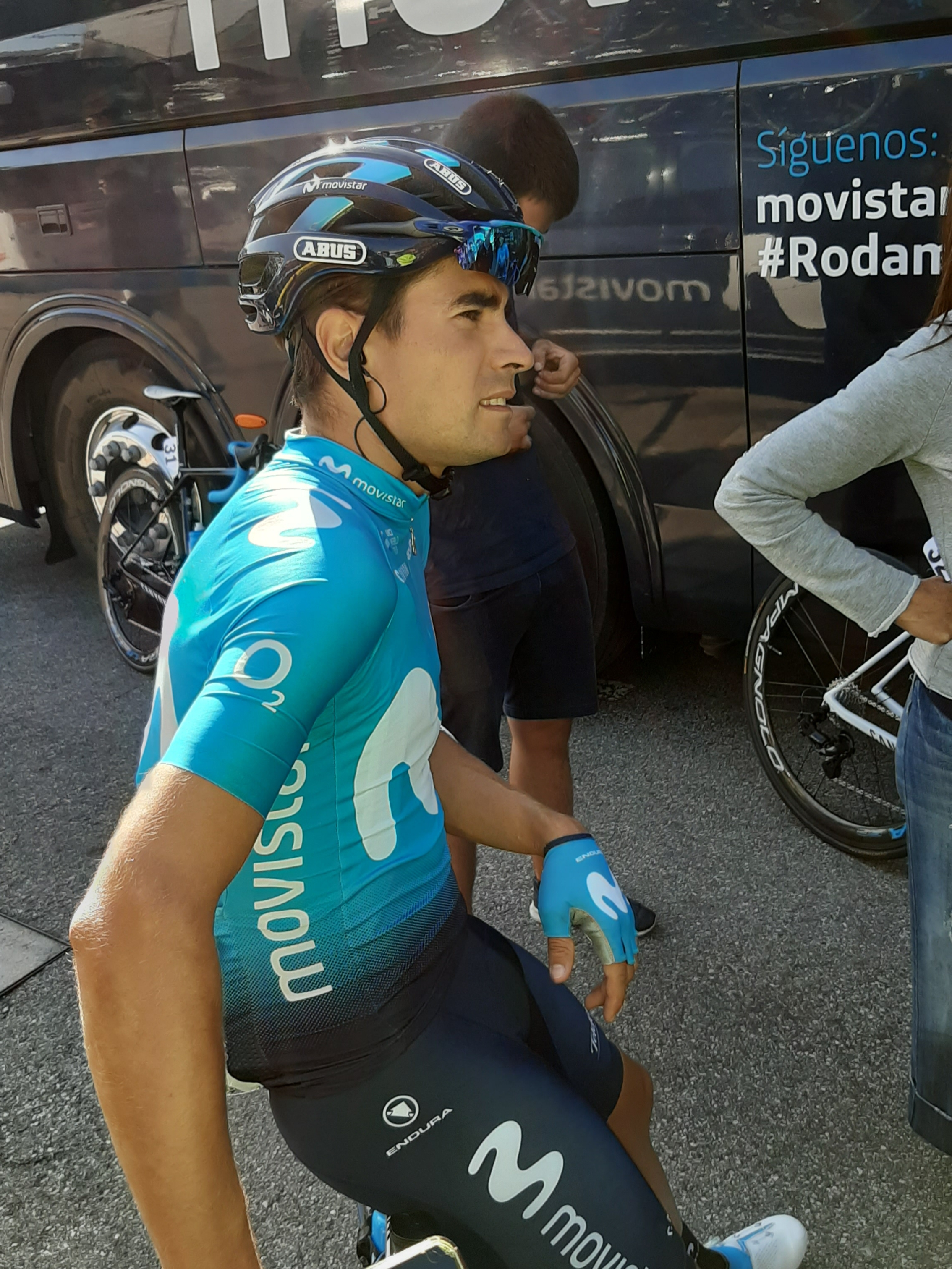 il ciclista Mikel Landa alla partenza del Giro dell'Emilia 2019